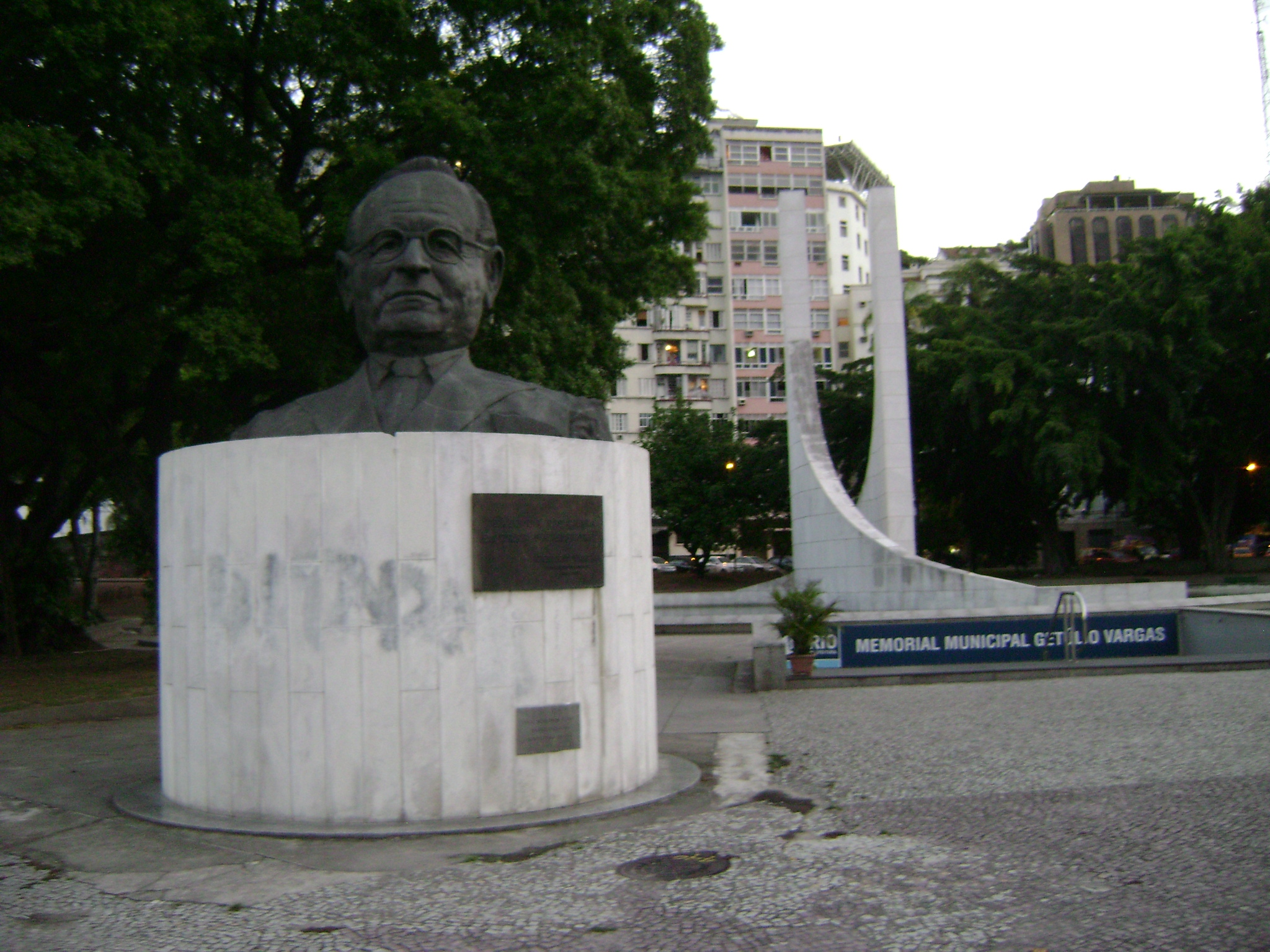 Memorial Getúlio Vargas na cidade de Rio de Janeiro, Brasil.